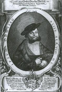 Ernst der Bekenner Fuerst von Lueneburg Kupferstich_von_P._Troschel_im_17._Jahrhundert